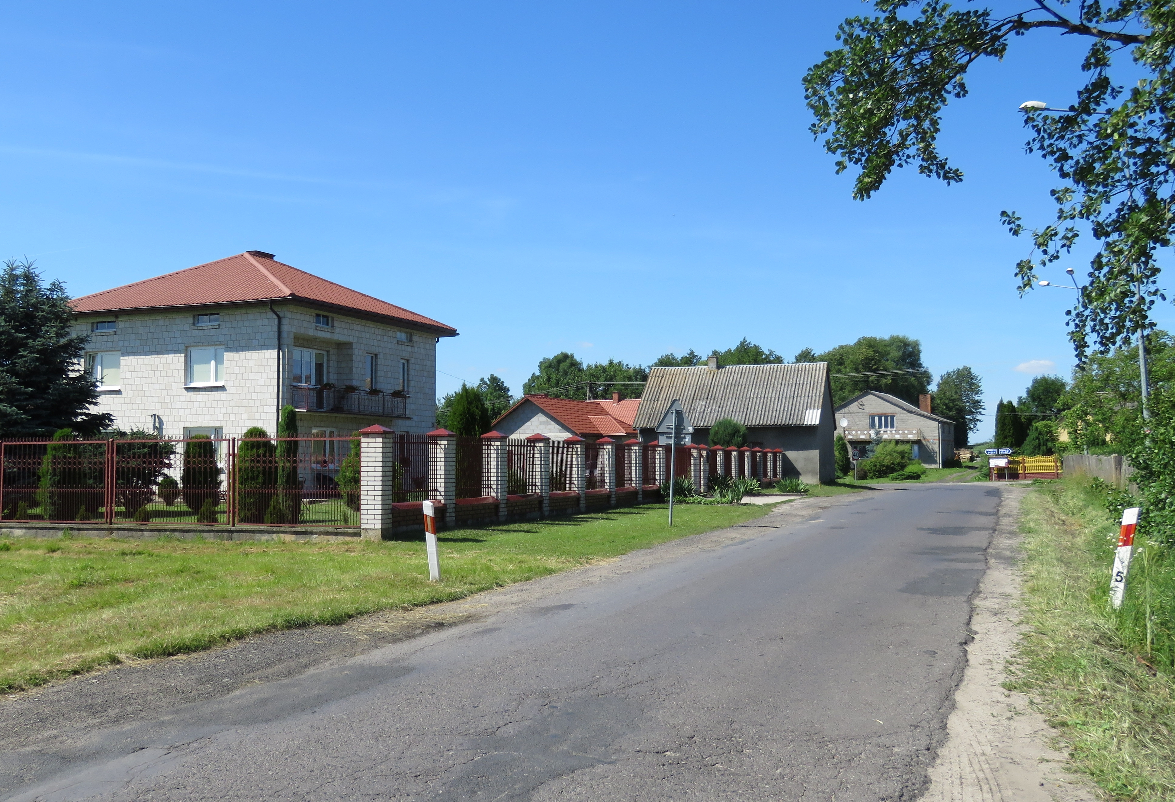 Kowala-Duszocina